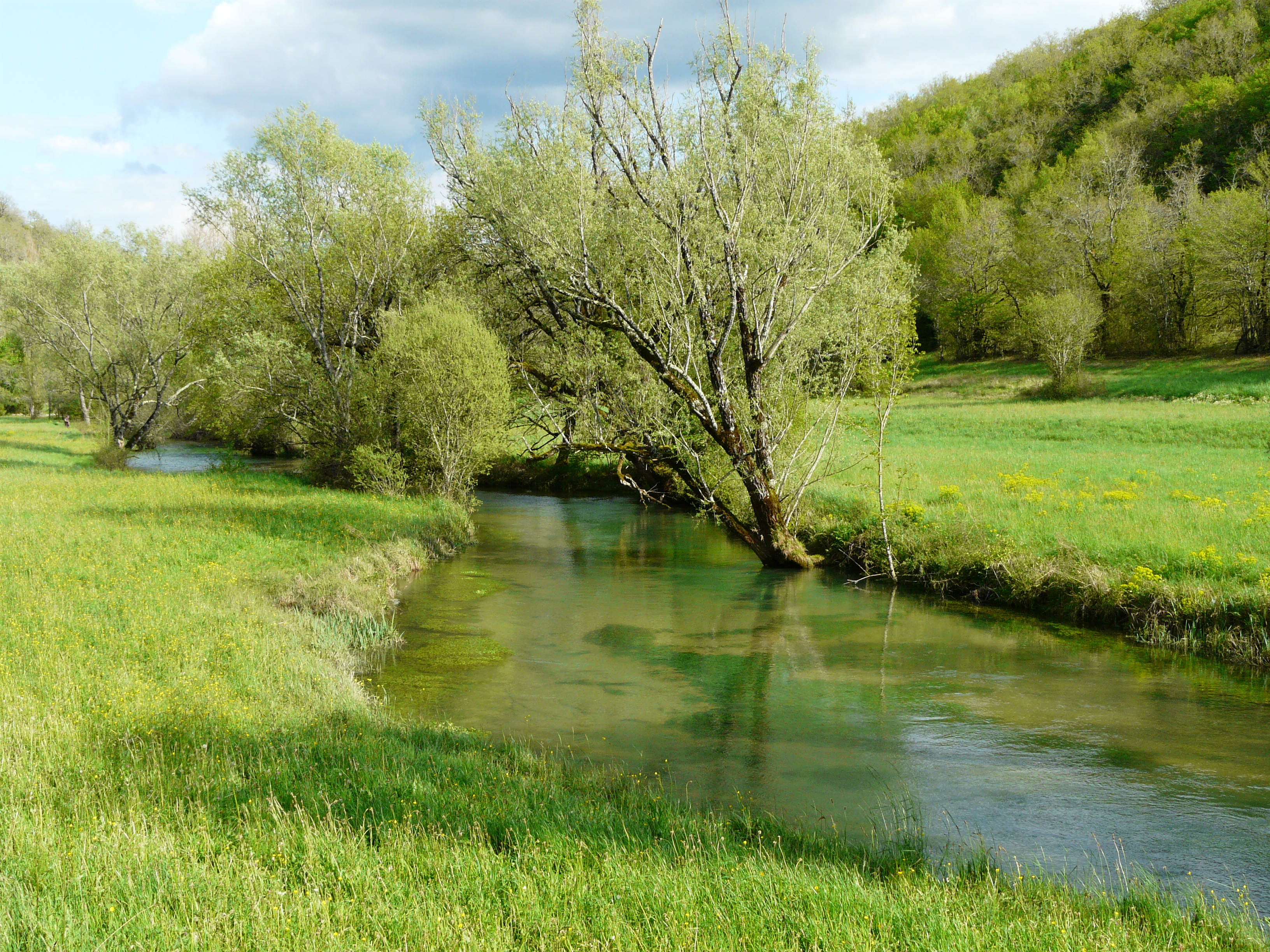 Le Coly, un kilomètre en contrebas de sa résurgence, le long de la route départementale 62, La Cassagne, Dordogne, France. Vue vers l'amont.